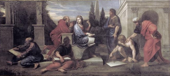 ASPASIE AU MILIEU DES PHILOSOPHES DE LA GRECE ; Salon : Salon des Nobles, Grands appartements du Château de Versailles Emplacement : voussure ; est